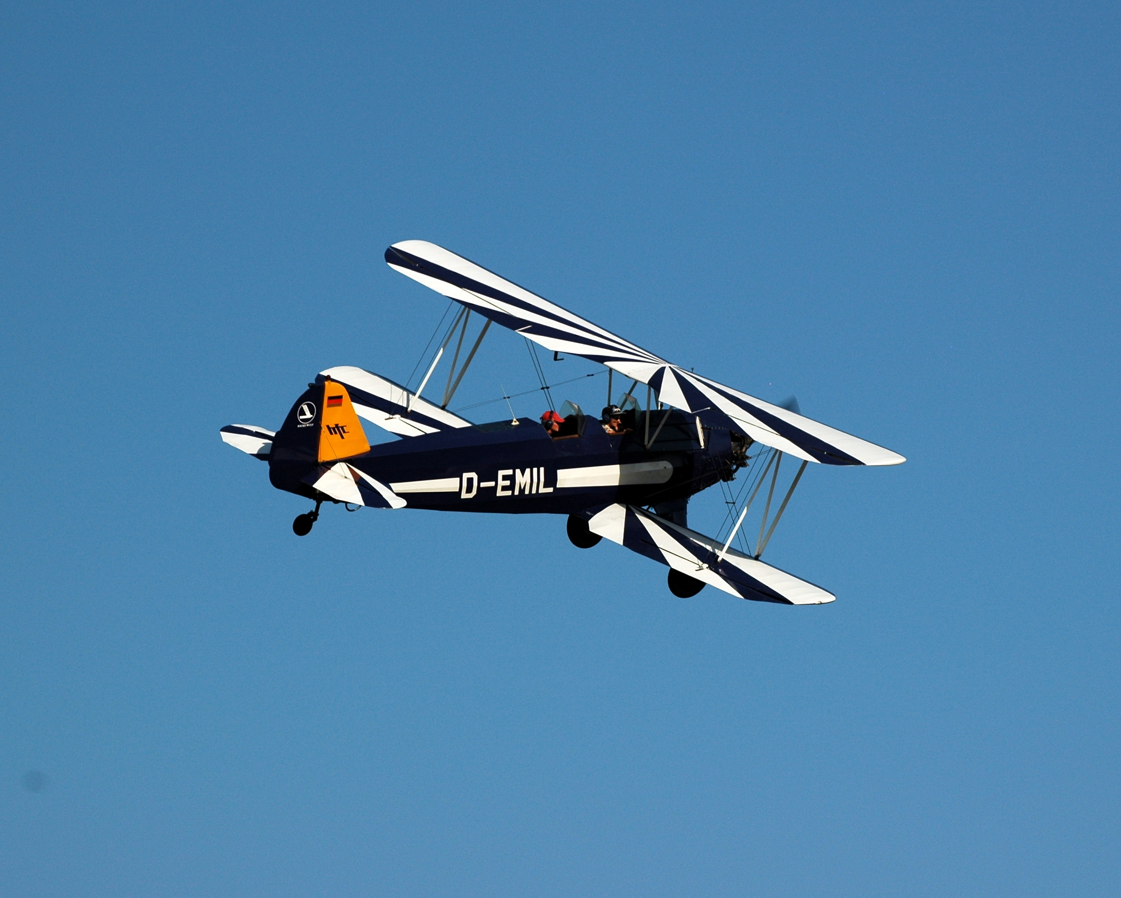 Flugplatz Bensheim - D-EMIL